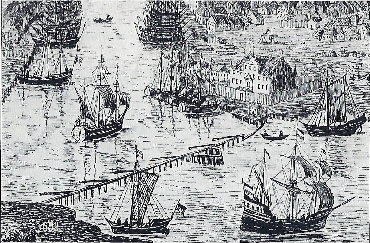 Der Holländer Baum über den Pregel im alten (noch nicht vereinigten) Königsberg, links die Kosse